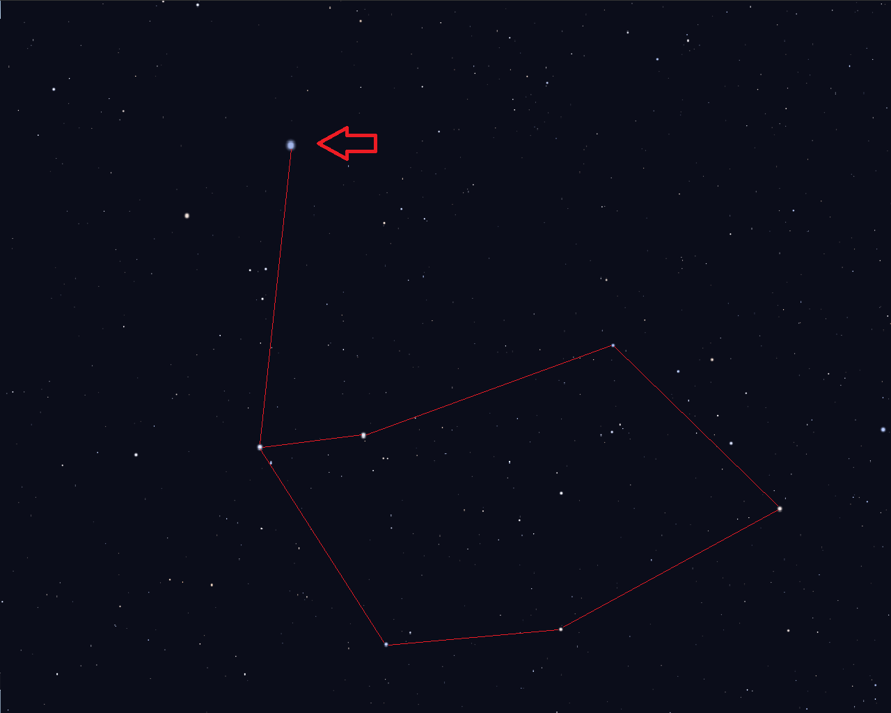 Peacock, desde una imagen general de la constelación del pavo